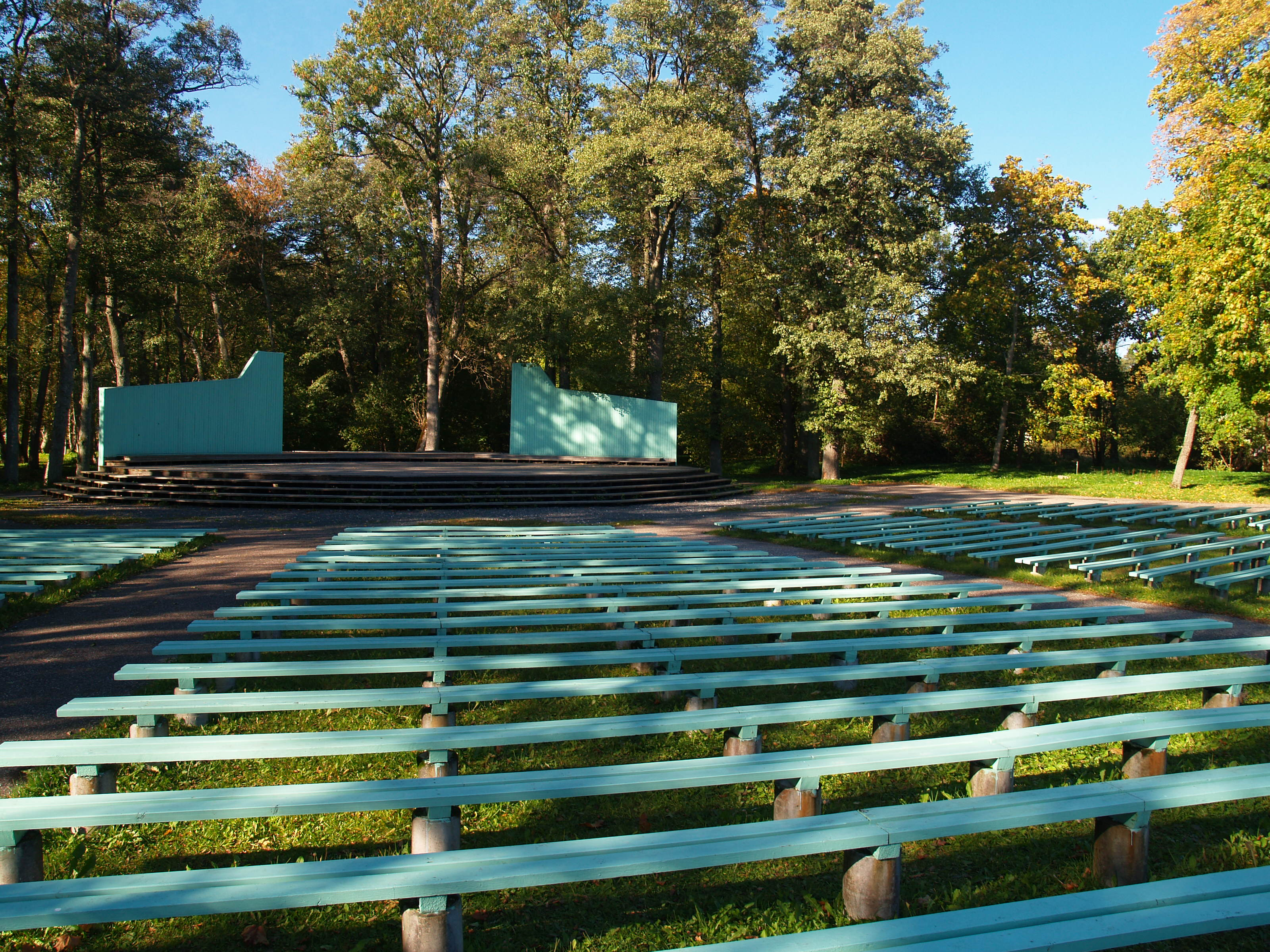 Kärdla laululava